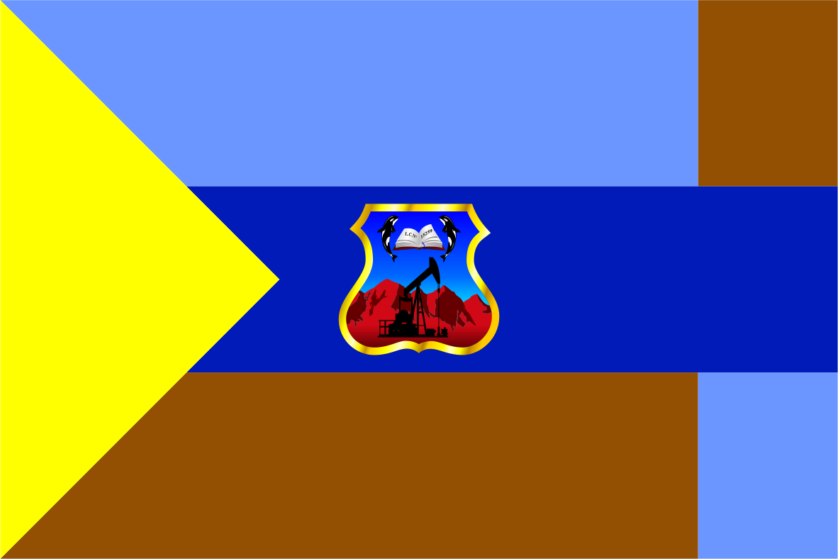 Distrito de Los Órganos - Provincia de Talara - Región Piura